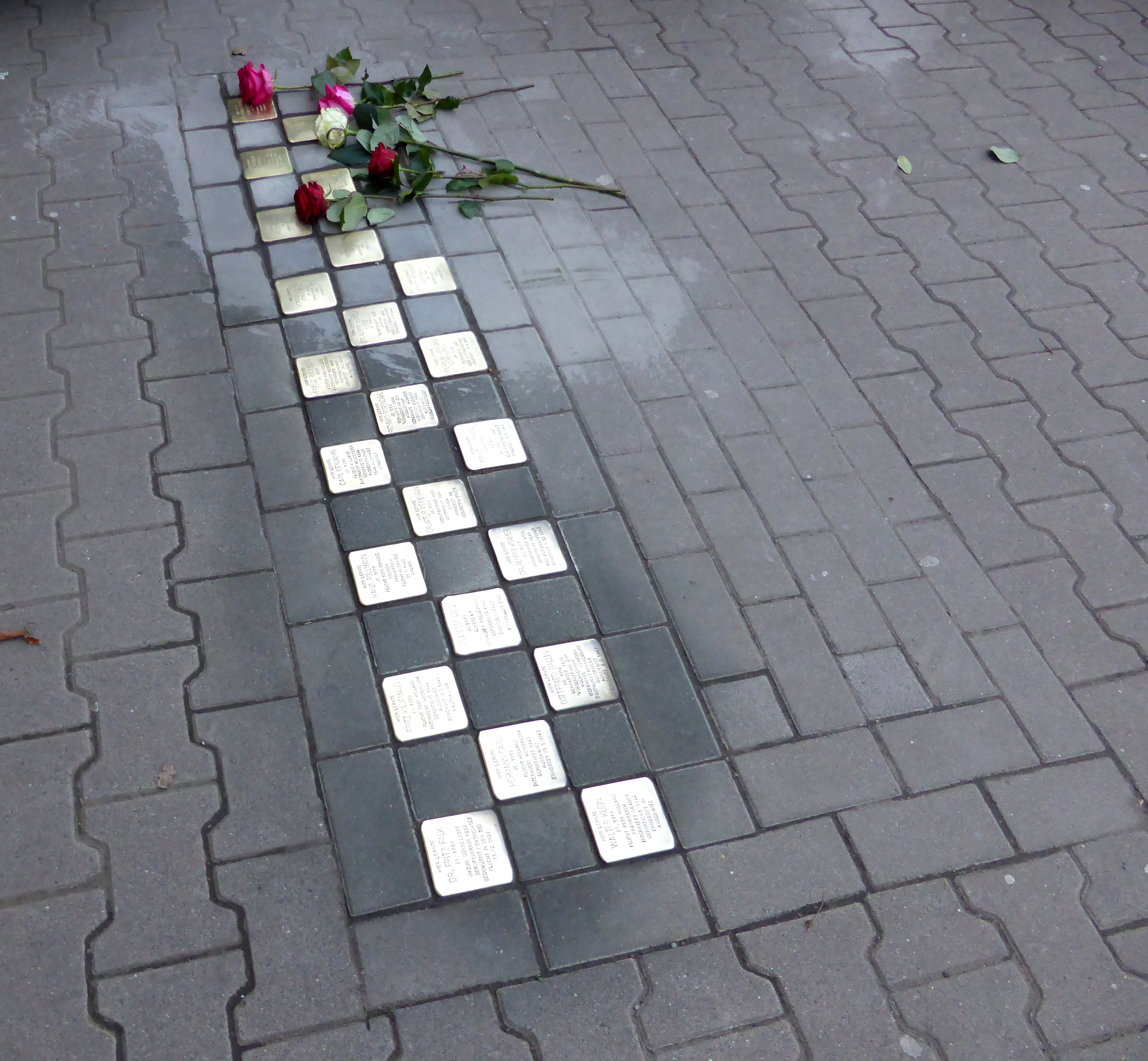 Stolperstein: Stolpersteinverlegung am 19. März 2019 am Gymnasium Kreuzgasse, Köln.